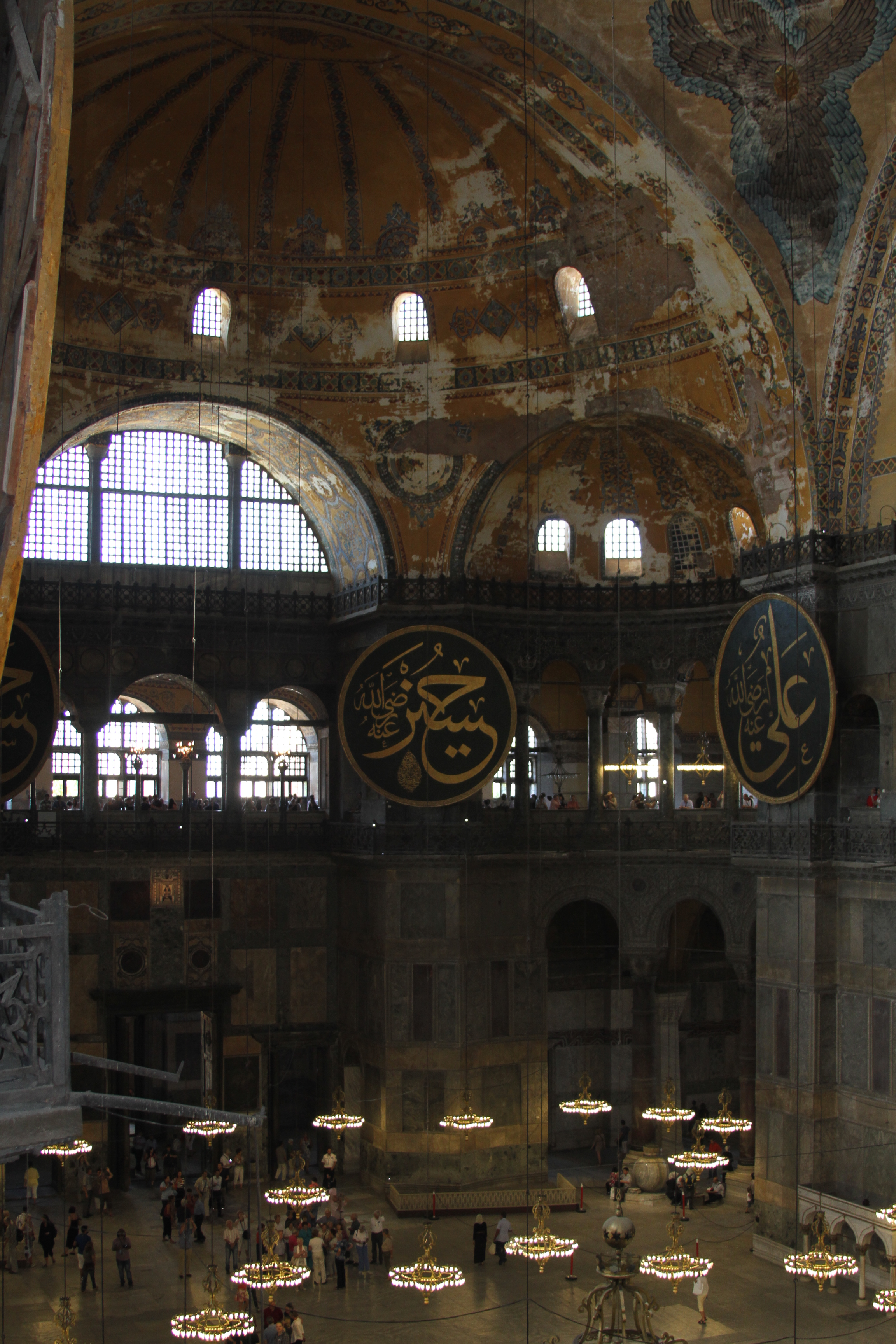 Interior de Hagia Sophia